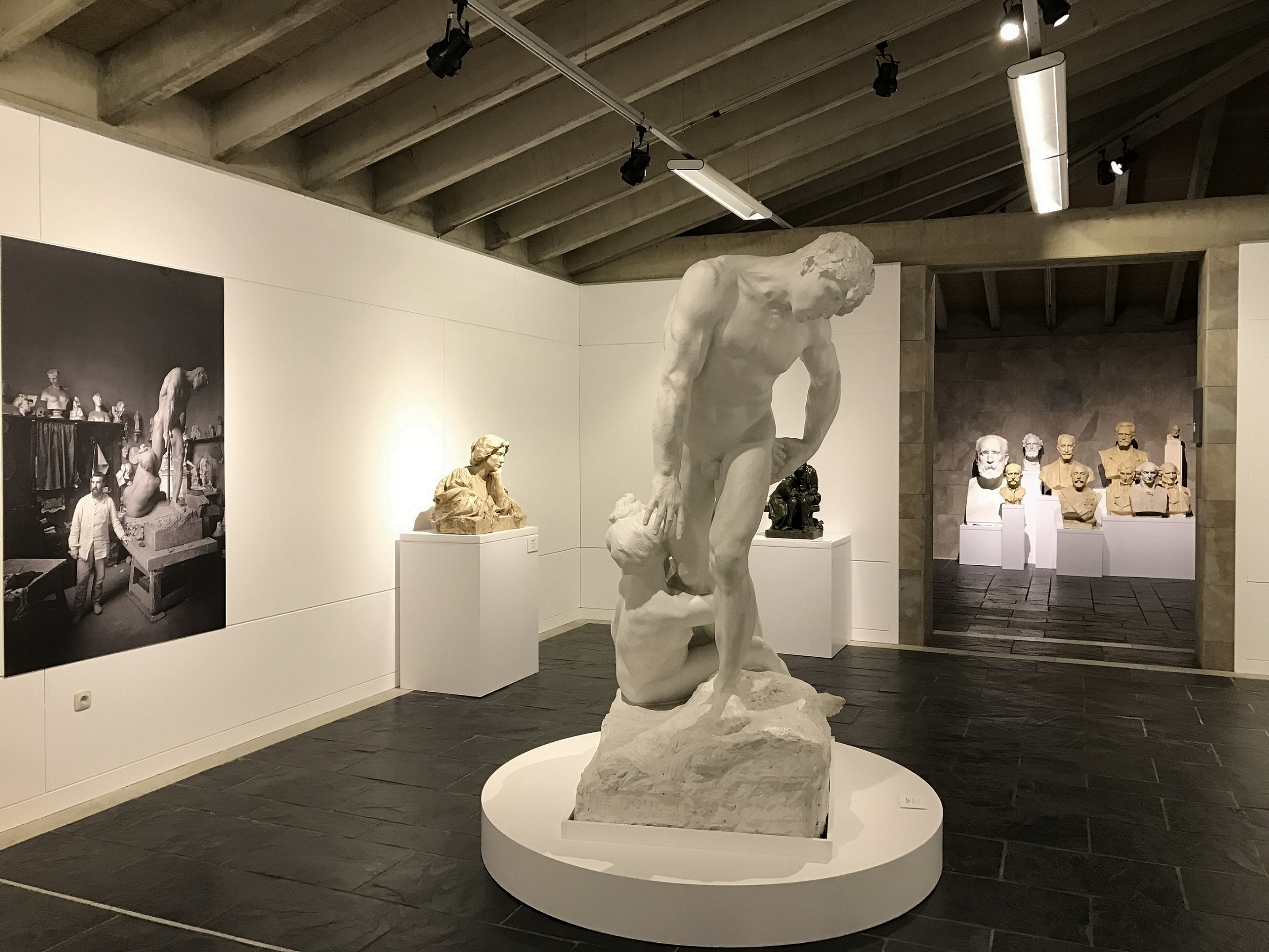 Sala dedicada a Miquel Blay al Museu de la Garrotxa d'Olot. En primer pla una imatge de l'escultura "Le boulet"